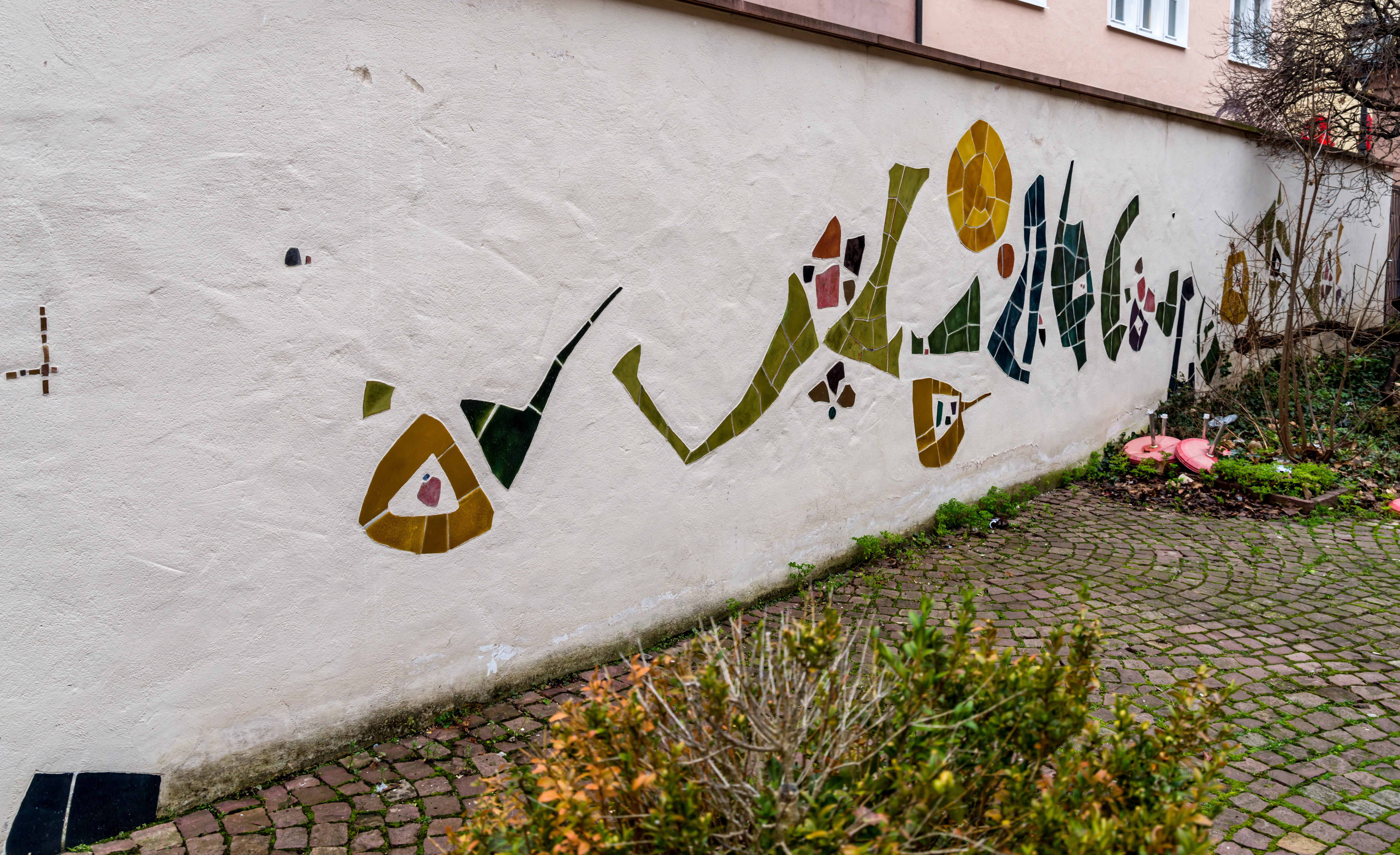 Bilder aus Freiburg